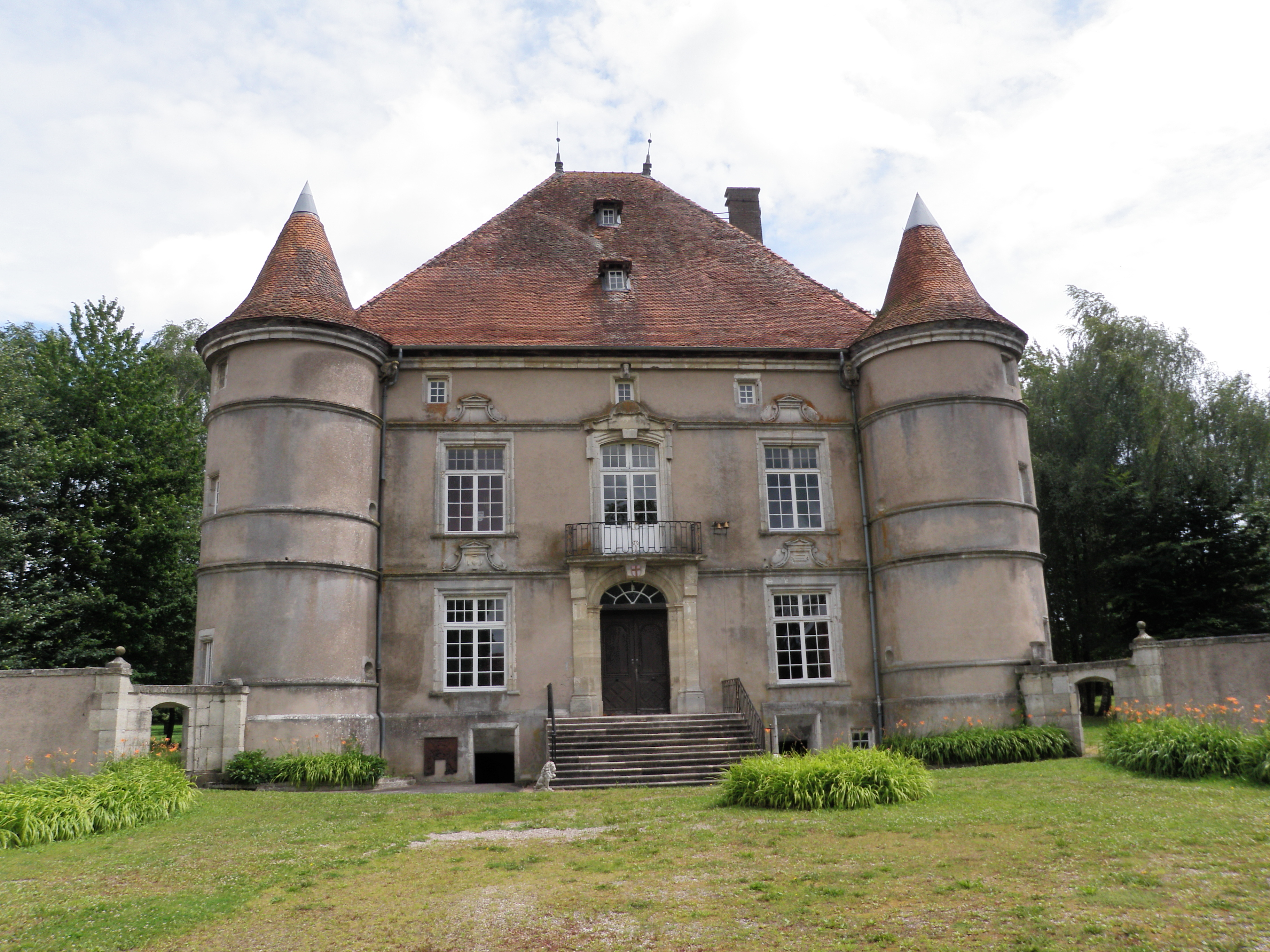 Façade ouest (côté village)